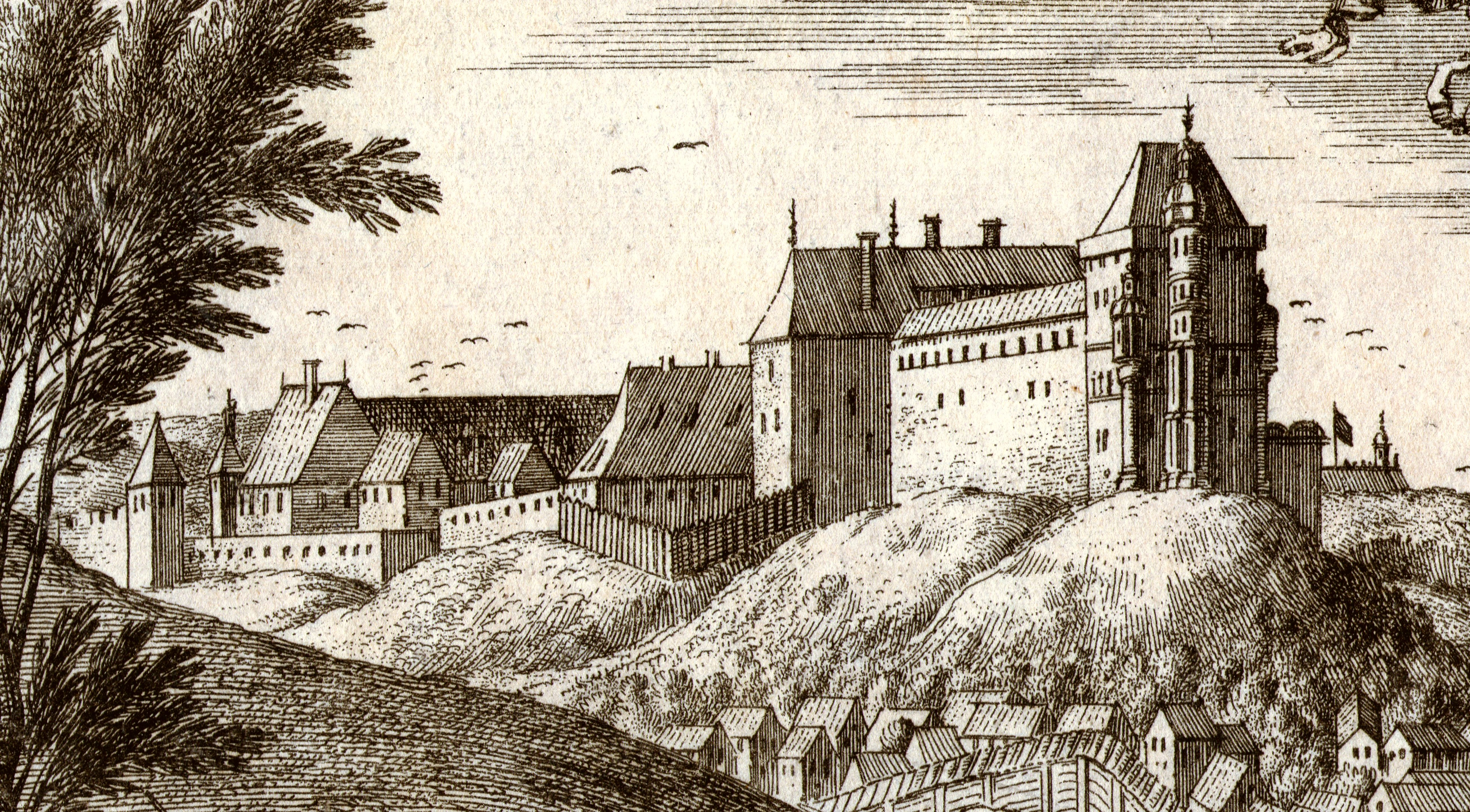 Zamek w Pińczowie w 1657 roku z rysunku Erika Jönsona Dahlberga